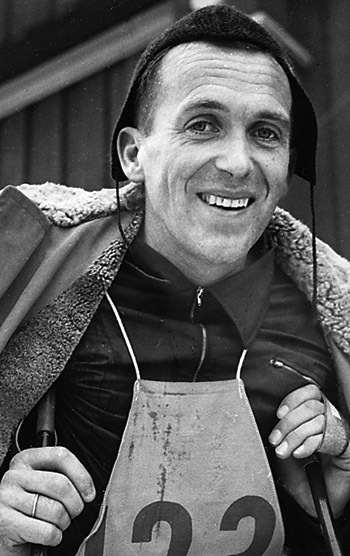 Hallgeir Brenden